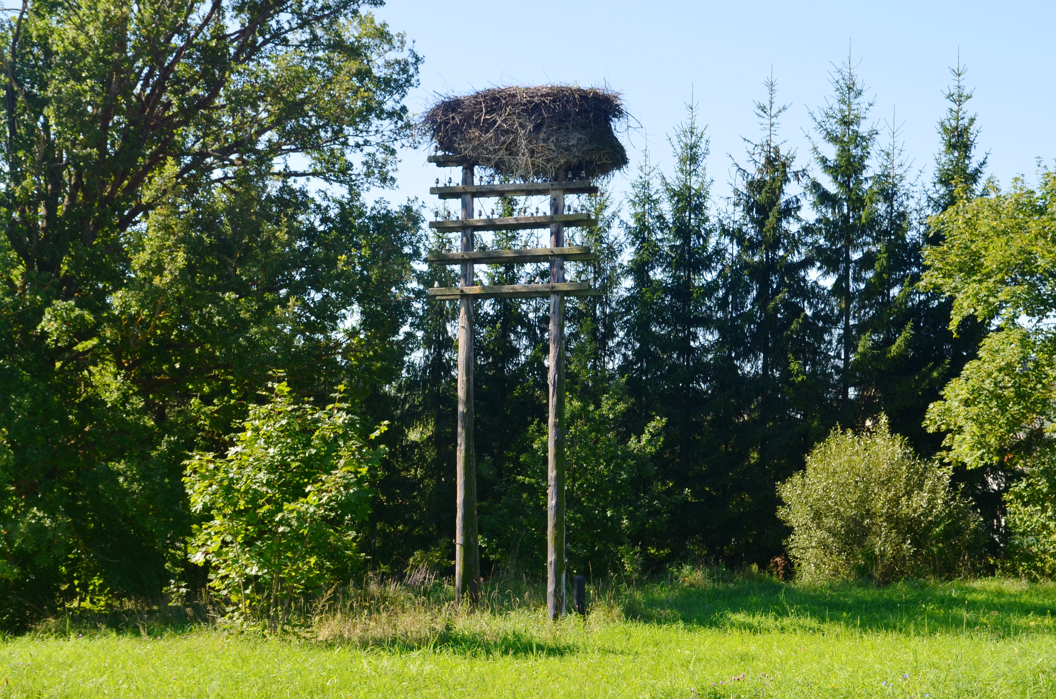 Medinis elektros stulpas, Antazavė